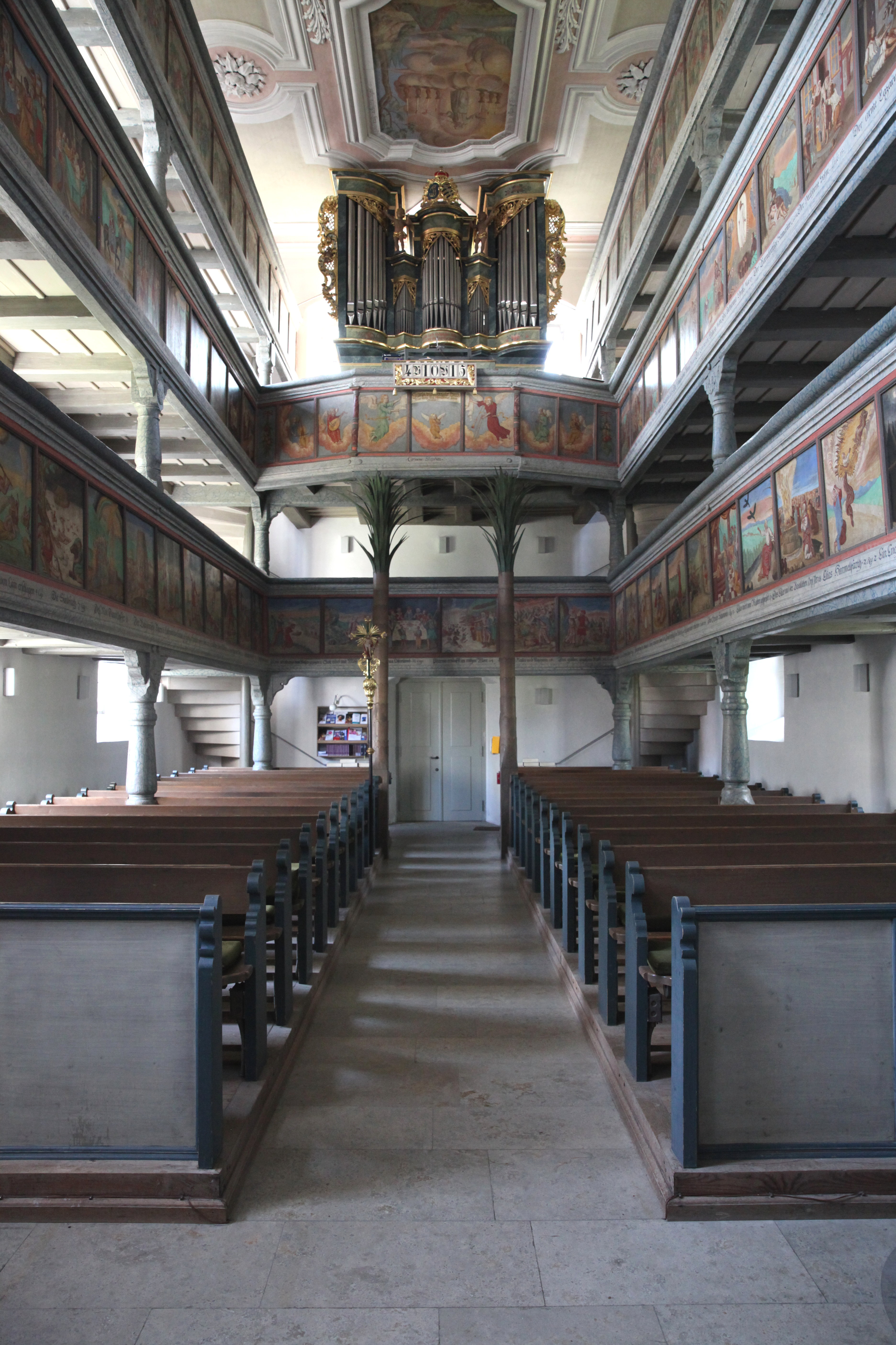 Empore, Evangelische Pfarrkirche Großgarnstadt